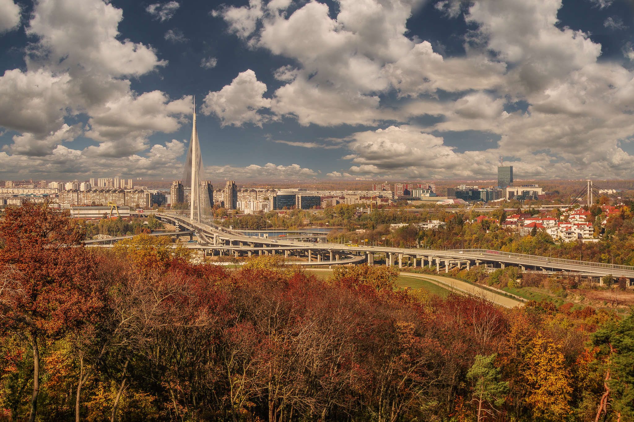 Ово је фотографија заштићеног природног добра у Србији под шифром: СП036This is a a photo of a natural area in Serbia with ID: СП036 Pogled na most na Adi sa Ski staze u Kosutnjaku